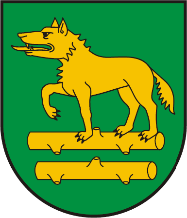 Herb gminy Wilkołaz.